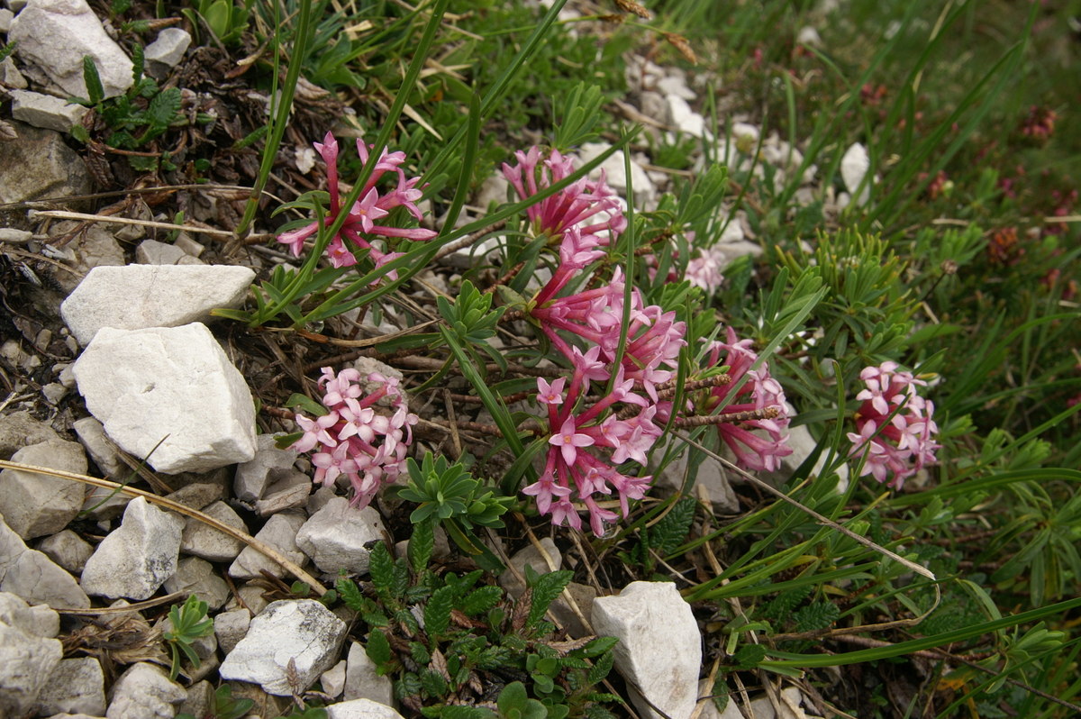 Progasti volčin na Kepi.